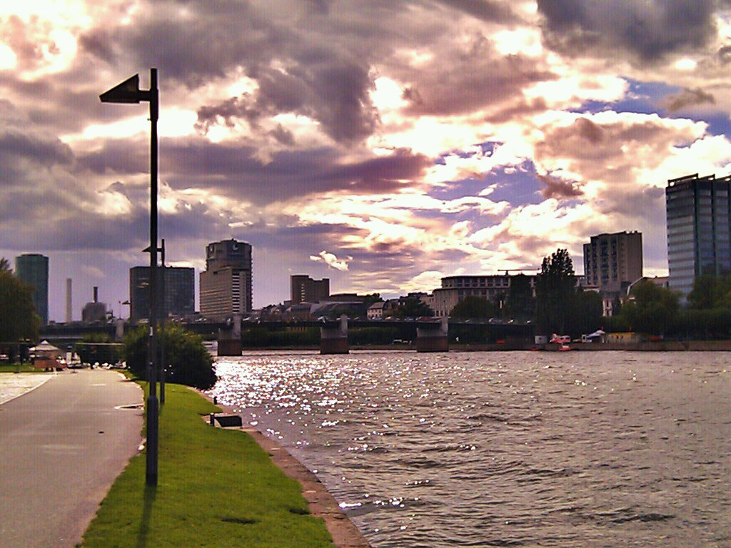 Main in Frankfurt am Main